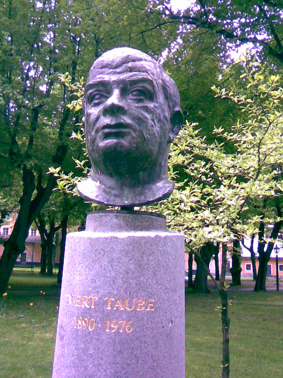 Evert Taube monument, Maria Magdalena kyrkogård, Södermalm, Stockholm